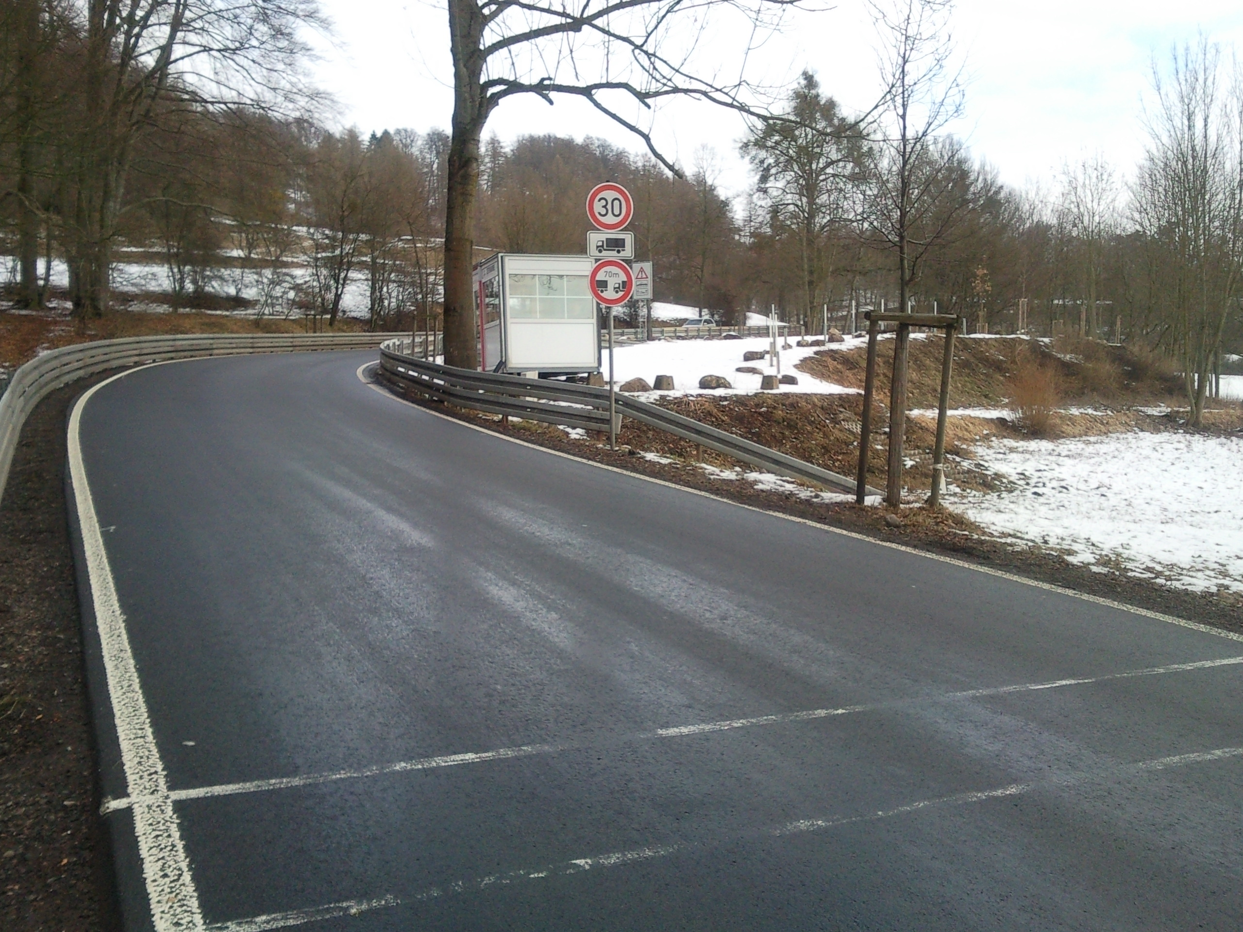 Startlinie des Glasbachrennens. Im Hintergrund ein Container für Rennleitung und Zeitnahme